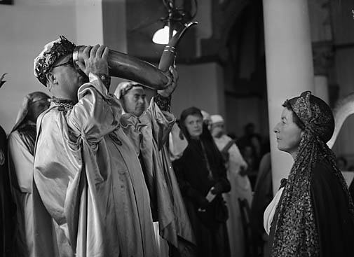 Teitl Cymraeg/Welsh title: Eisteddfod Genedlaethol Cymru 1952, Aberystwyth Ffotograffydd/Photographer: Geoff Charles (1909-2002) Nodyn/Note: Image shows the Archdruid, Cynan holding the Hirlas Horn at the ceremony Dyddiad/Date: August 1, 1952 Cyfrwng/Medium: Negydd ffilm / Film negative Cyfeiriad/Reference: (gch16088) Rhif cofnod / Record no.: 3370775 Rhagor o wybodaeth am gasgliad Geoff Charles yn Llyfrgell Genedlaethol Cymru More information about the Geoff Charles Collection at the National Library of Wales